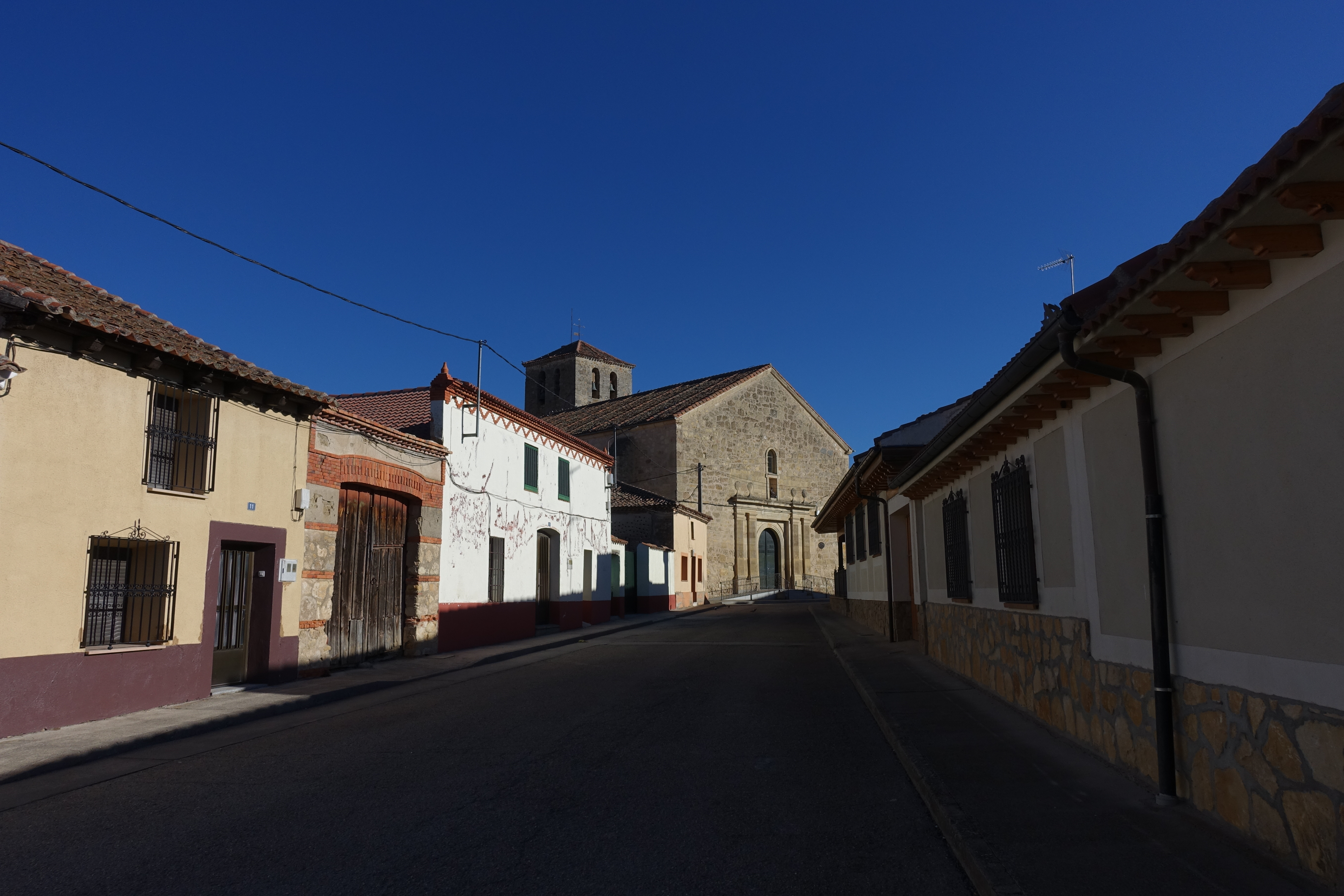 Iglesia de la Cruz, Garcillán (Segovia, España).